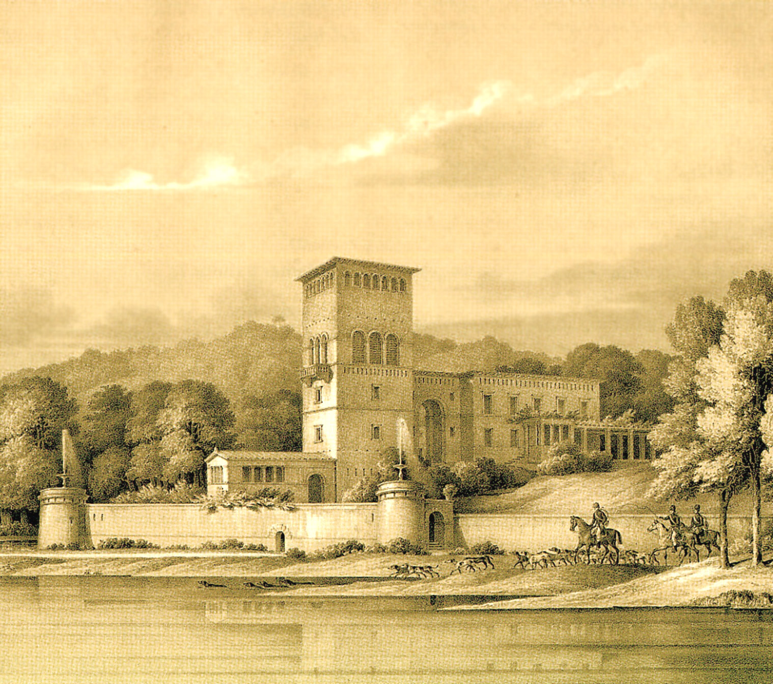 Hofgärtner- und Maschinenhaus (Persius, um 1840)